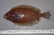 Gallo Moteado (Lepidorhombus boscii)